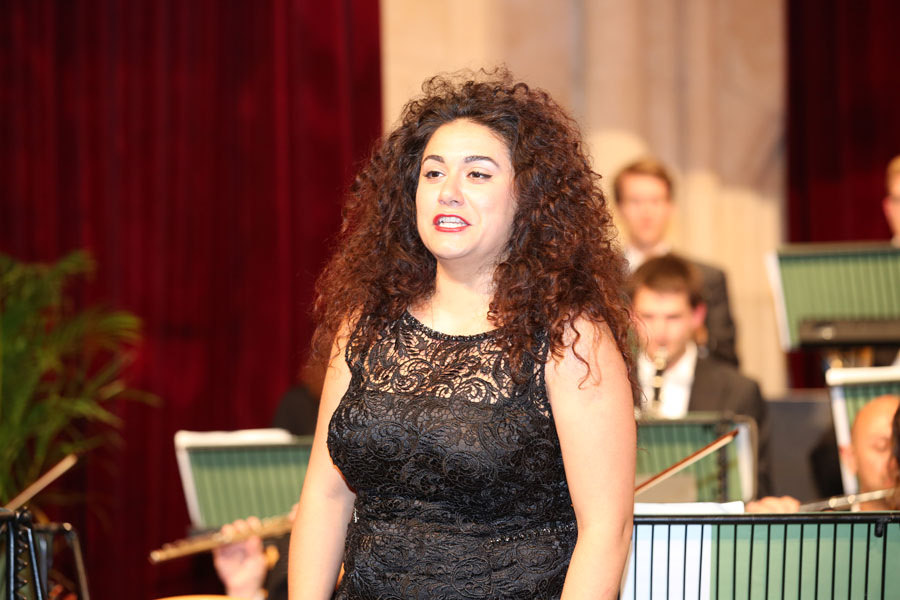 Anna Aglatova -1035